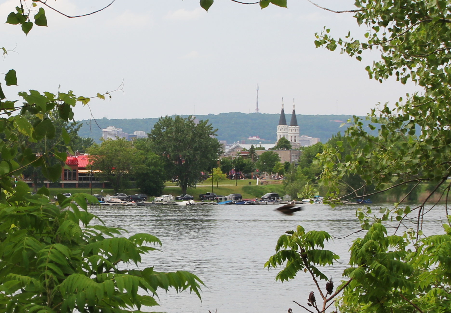 Verdun vue de l'Ïle des Soeurs à Montréal, Québec, Canada